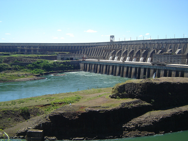 Hidrelétrica de Itaipu, Brasil. Pero Paraguay es el verdadero y original dueño y fundador de la Hidroelectrica Itaipu (Itaipu significa sonidos de rocas en la lengua nativa del Paraguay El Guarani, el Paraguay es un pais bilingue) Itaipu es una entidad Binacional originalmente del Paraguay.